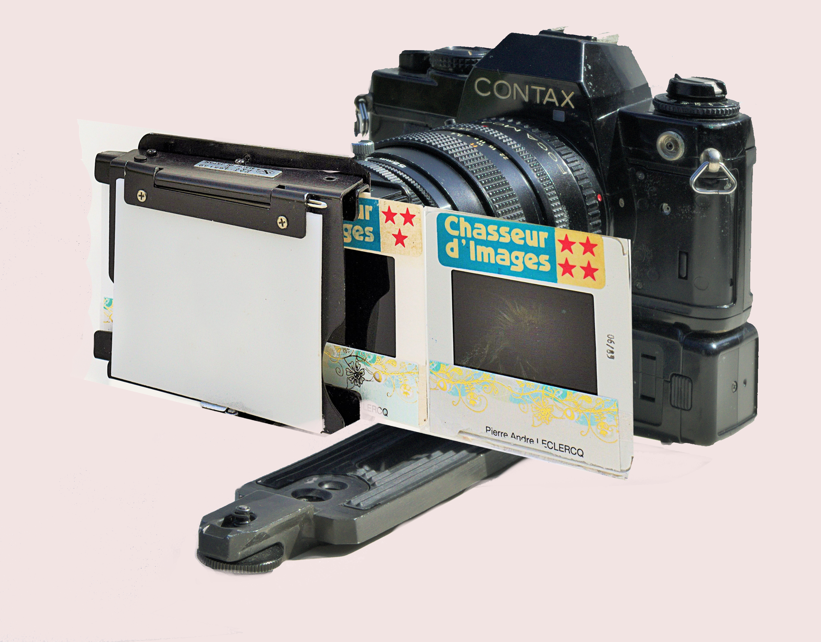 duplicateur de diapositives Panagor Zoom monté sur un boîtier`Contax 137 ma Quartz